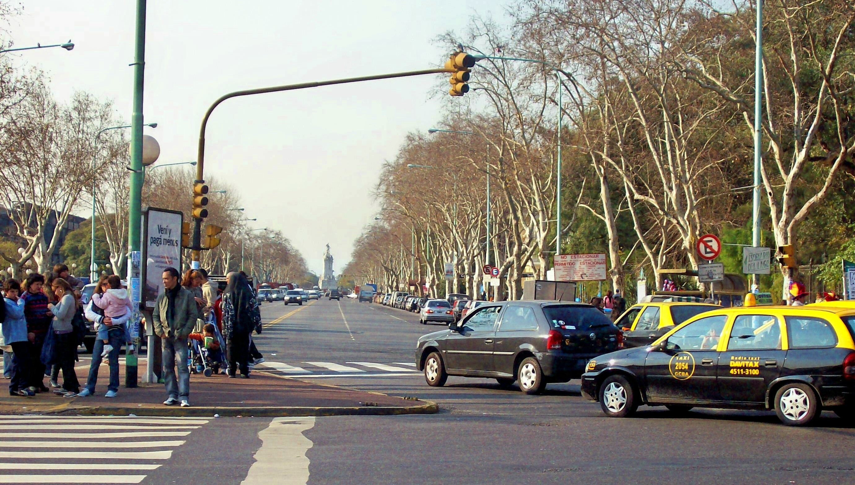 Avenida Sarmiento, en el Barrio de Palermo, en Buenos Aires. Al fondo se observa el Monumento de los Españoles. La foto está desde Plaza Italia, en dirección SO a NE